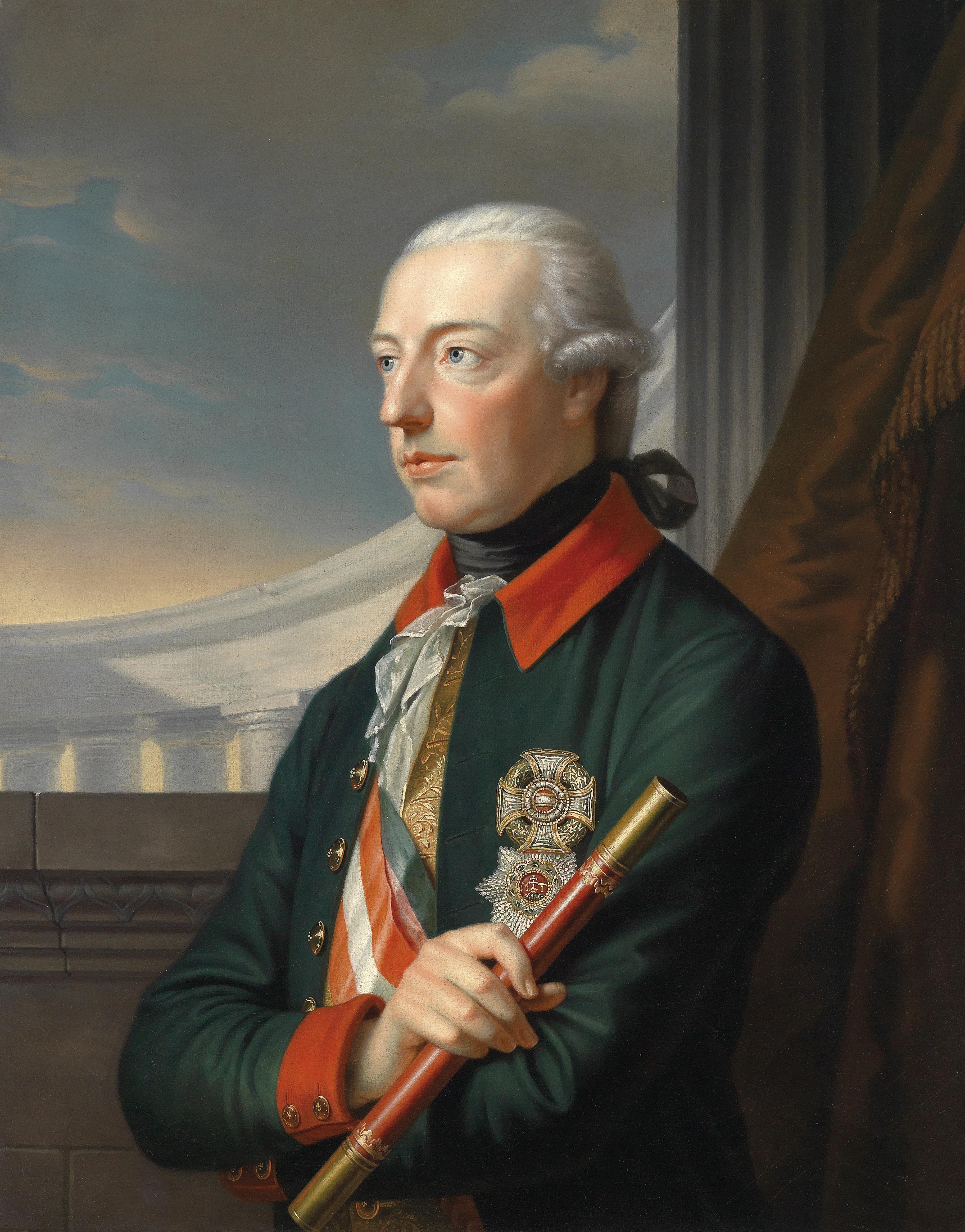 Bildnis Kaiser Joseph II. (1741–1790)